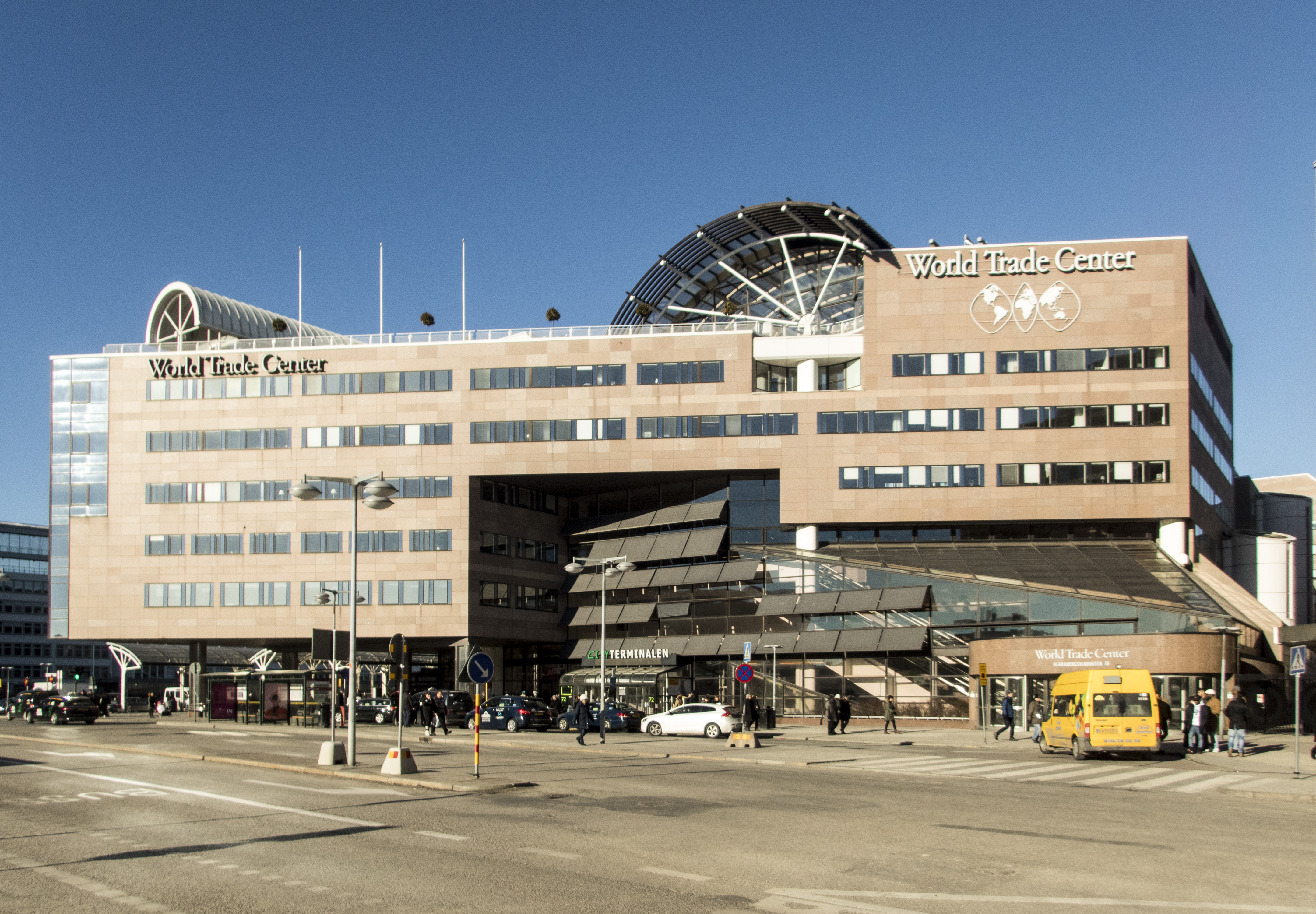 World Trade Center Stockholm